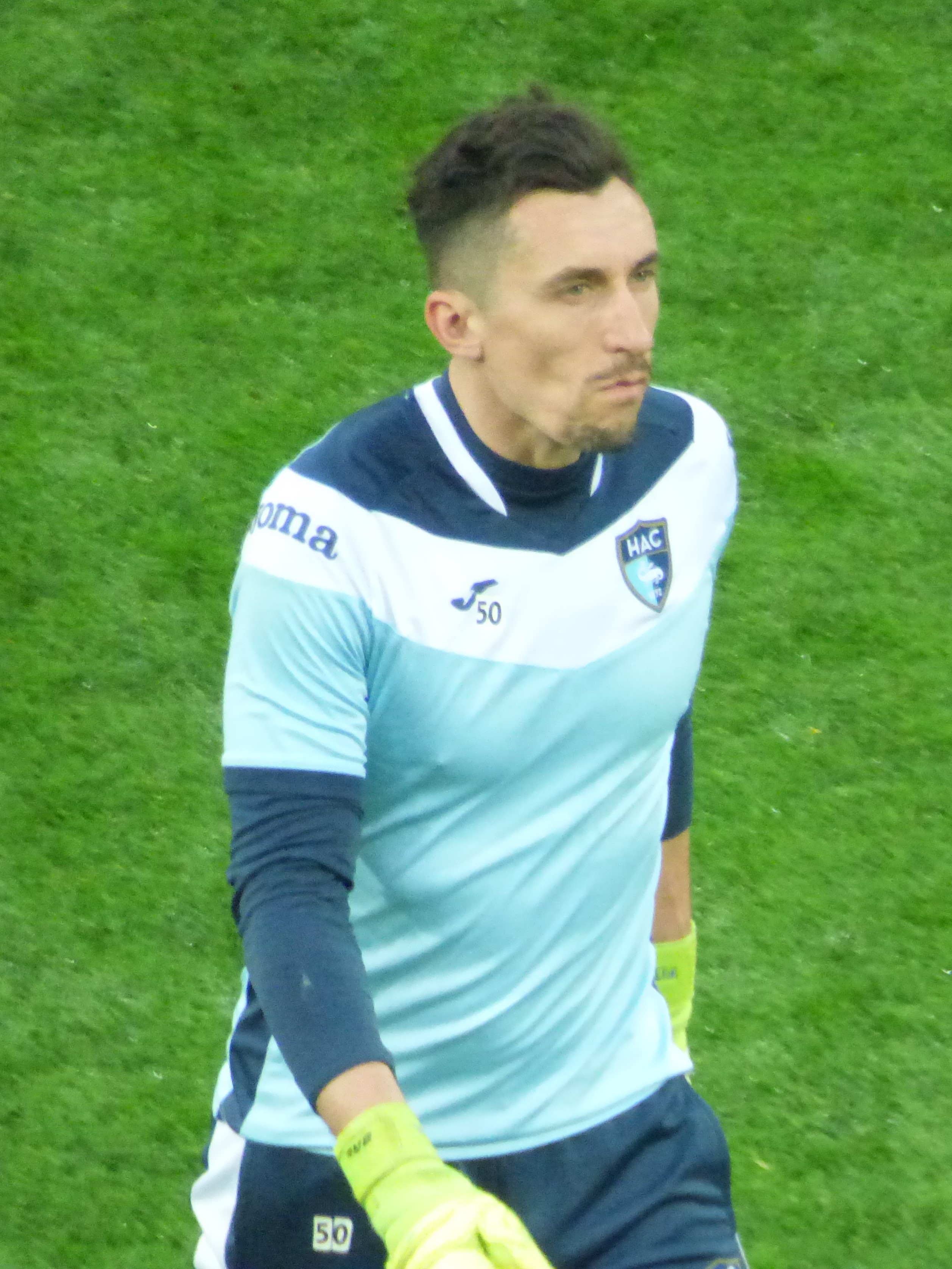 Arnaud Balijon avant le match Lens / Le Havre, comptant pour la 30ème journée du championnat de France de Ligue 2 2018-2019, le 1er avril 2019 au Stade Bollaert-Delelis.